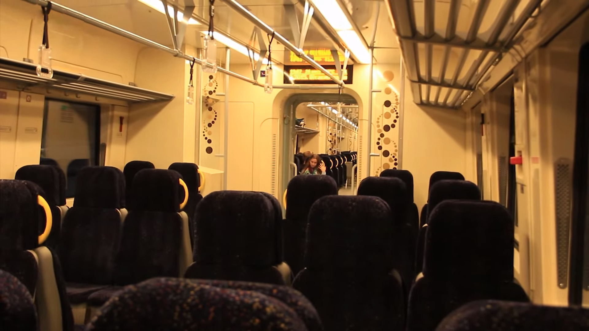 Салон дизель-поезда ДПКр2. Сиденья